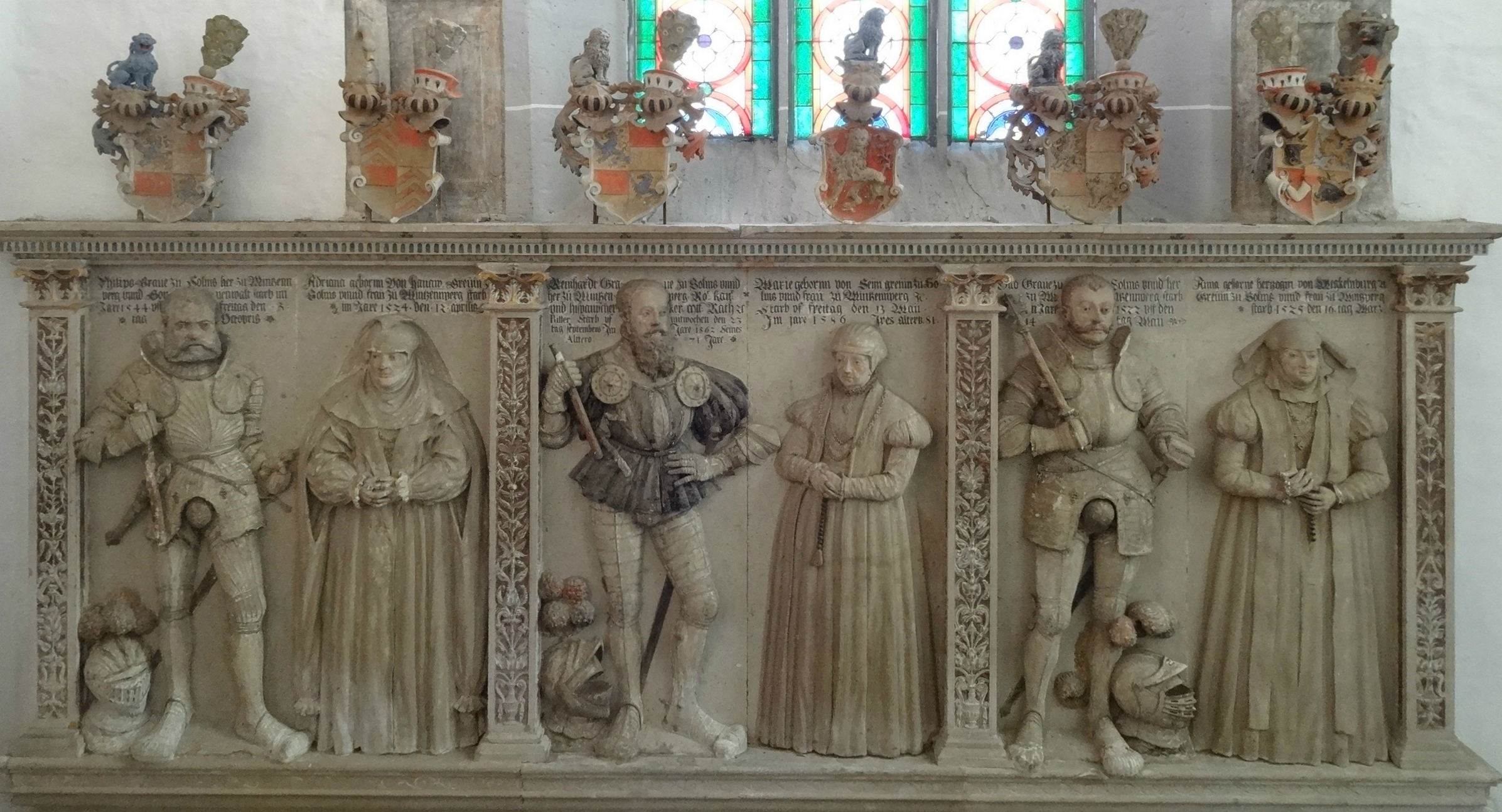 1) Graf Philipp zu Solms-Lich, gestorben am 3. Oktober 1544, und dessen Frau Adriana geborene Gräfin von Hanau, gestorben am 12. April 1524. 2) Graf Reinhard zu Solms-Lich, gestorben am 23. September 1562, und dessen Frau Marie geborene Gräfin von Sayn, gestorben am 15. Mai 1586. 3) Graf Otto zu Solms-Lich, gestorben am 14. Mai 1522, und dessen Frau Anna geborene Herzogin von Mecklenburg, gestorben am 16. März 1525. Im Chorhaupt des Chorumgangs, Marienstiftskirche Lich